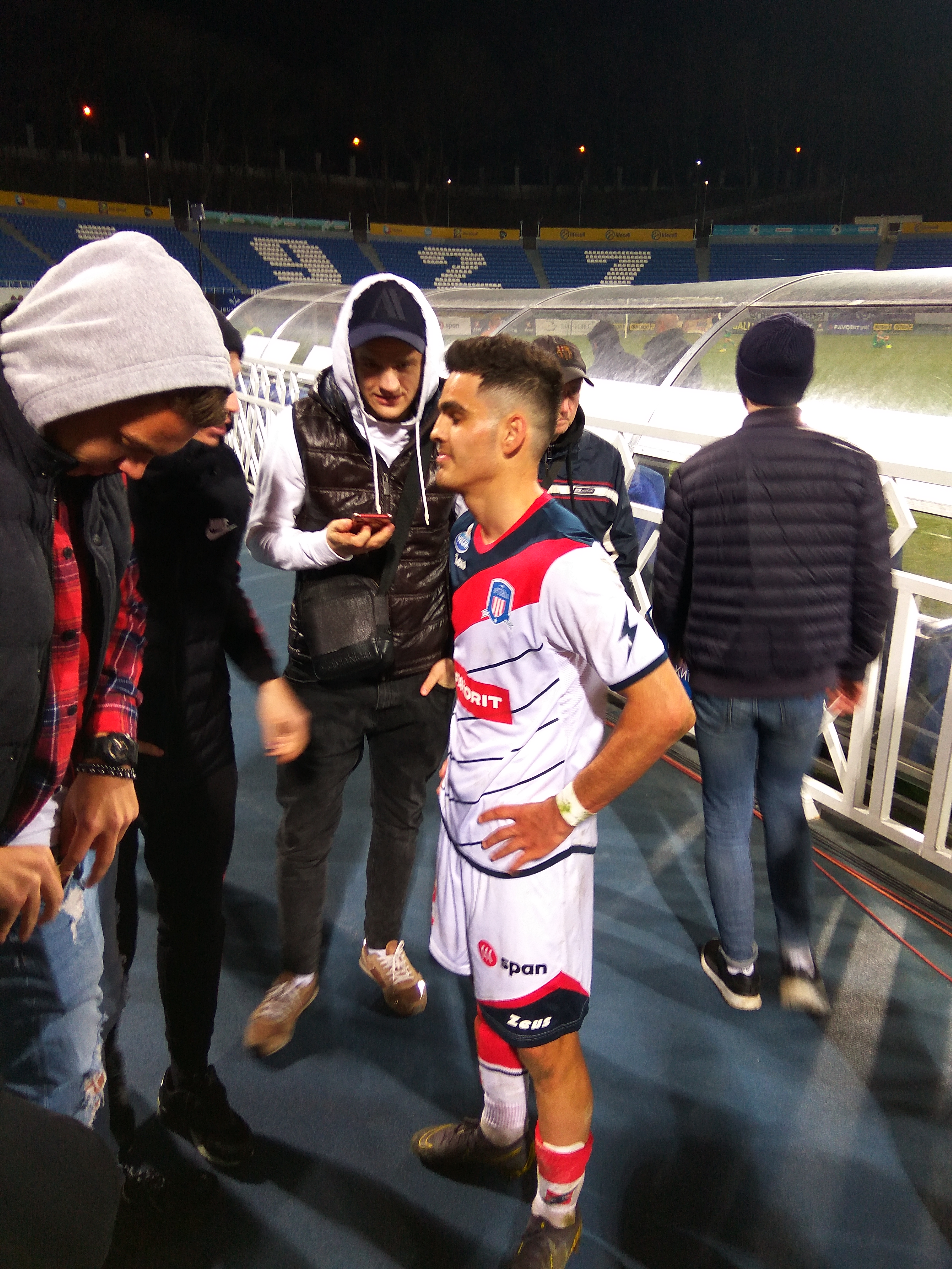 18.03.2019. Чемпіонат України з футболу. Арсенал-Київ - Ворскла (Полтава) 2:2